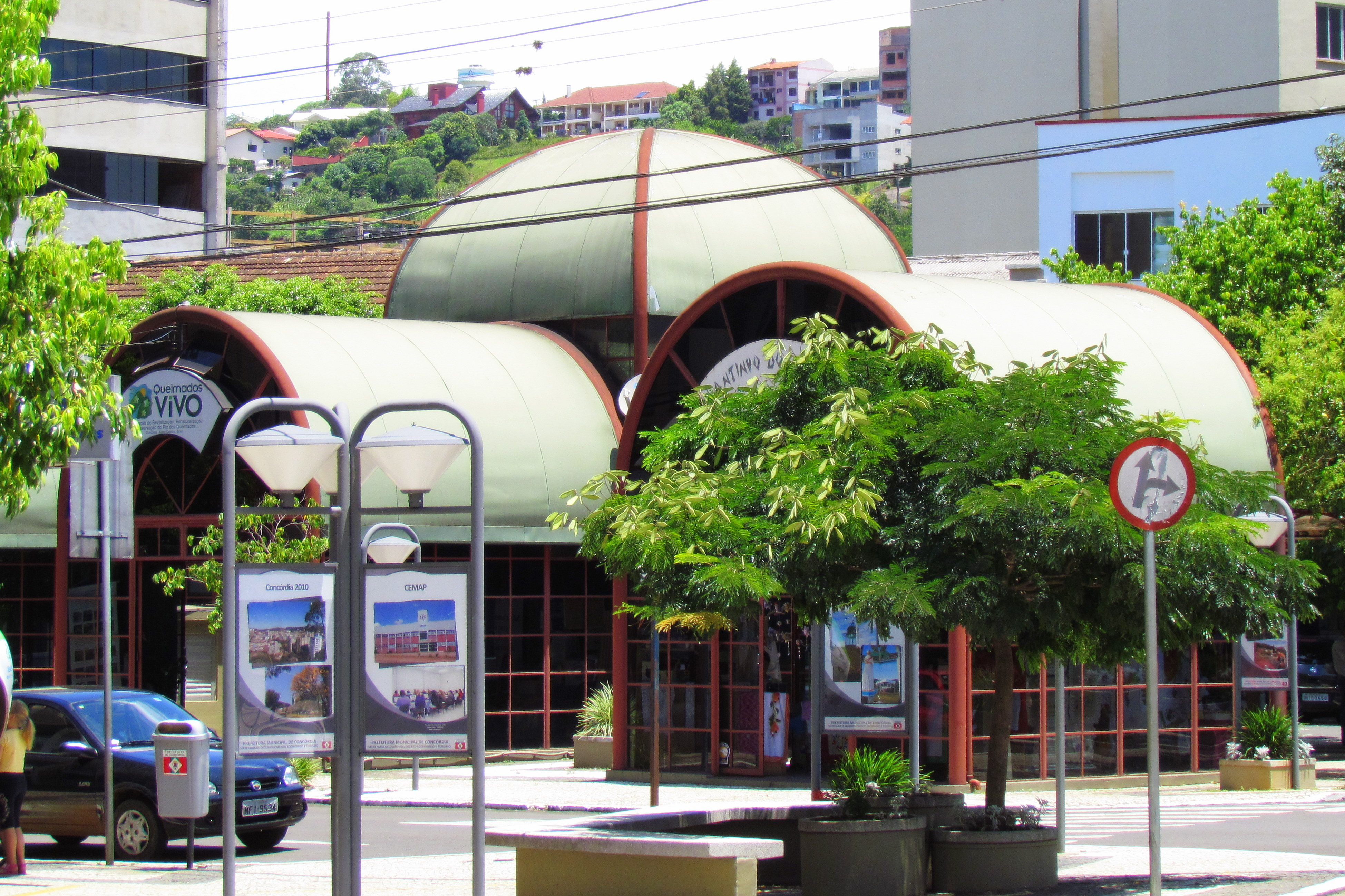 Quiosque da Rua do Comércio em Concórdia, SC. Localizado no Calçadão, próximo a praça Dogello Goss, possui uma choperia, café, uma banca de revistas, artesanato da ONG Queimados Vivo, o Águas do Alto Uruguai Convention & Visitors Bureau e o Centro de Informações Turísticas. É uma réplica da estufa do Jardim Botânico de Curitiba e um dos cartões-postais da cidade.